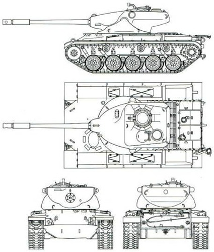 Схема опытного танка T69